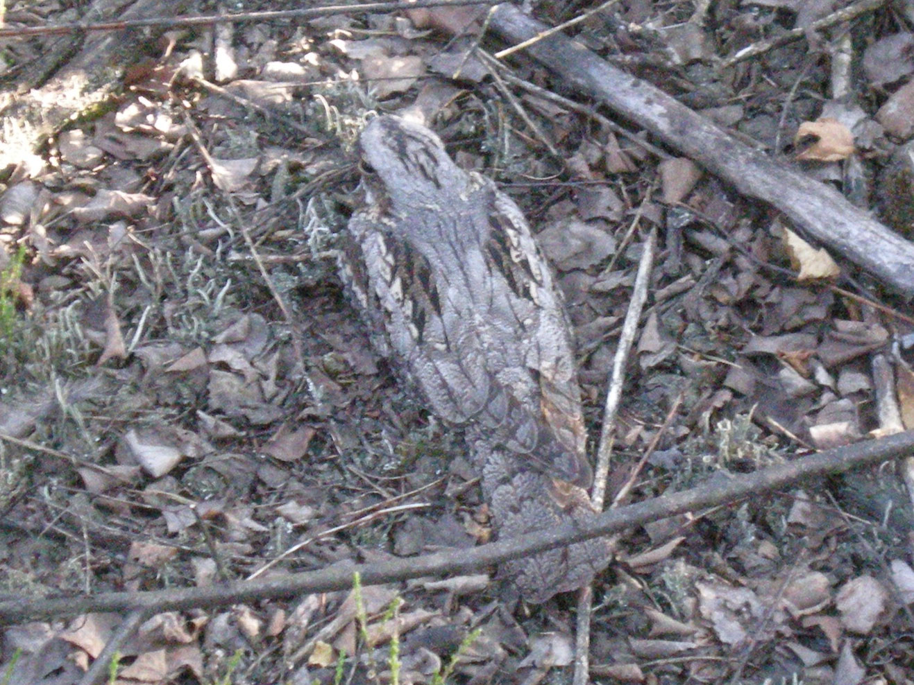 Lelek zwyczajny, lelek kozodój